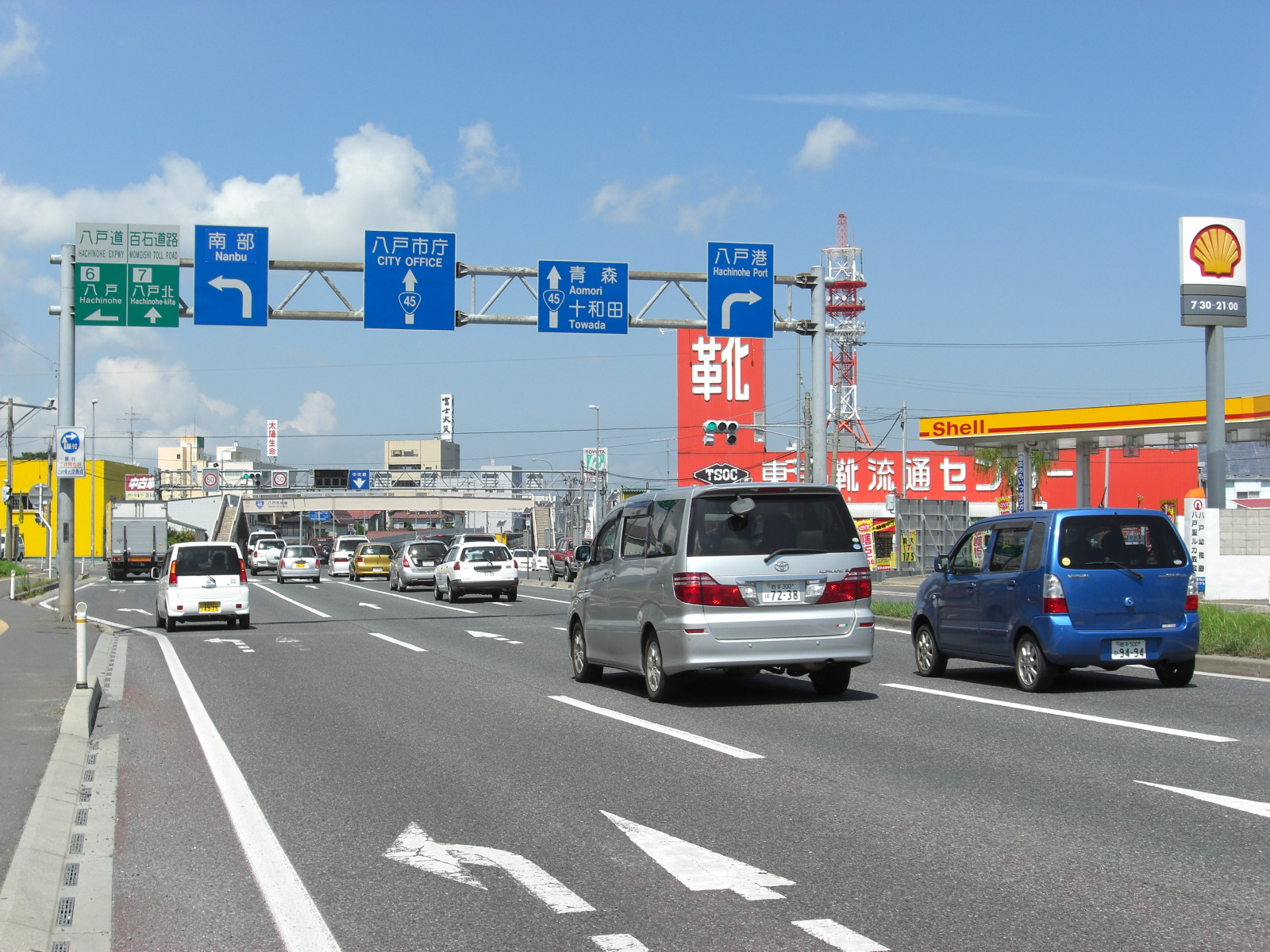 八戸市